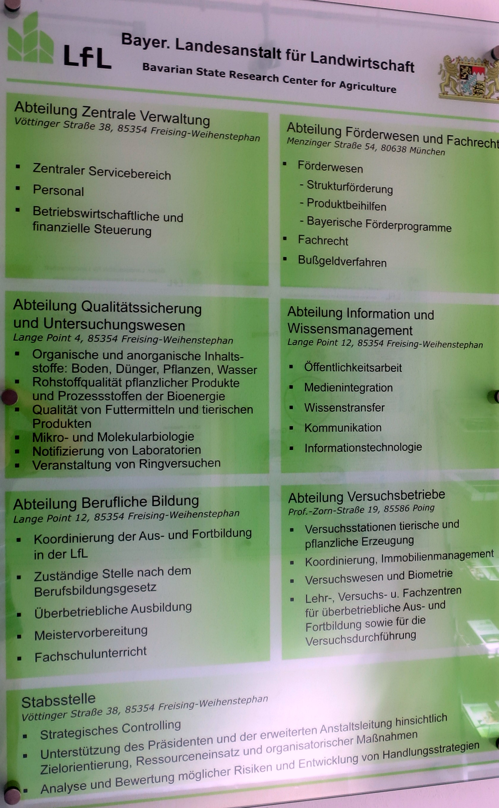 Infotafel im Verwaltungsgebäude 01